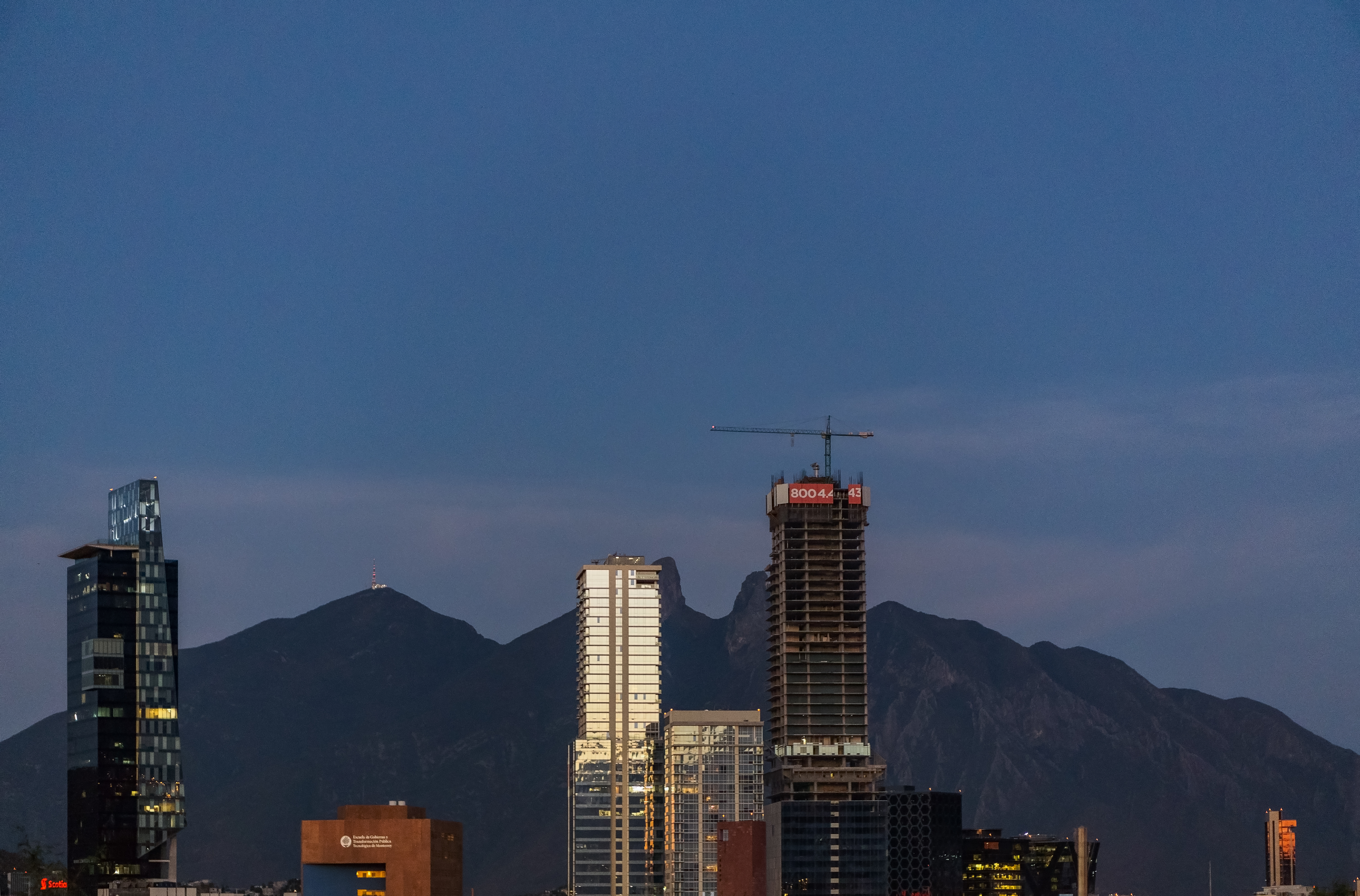 Razcacielos, al fondo cerro de la silla.